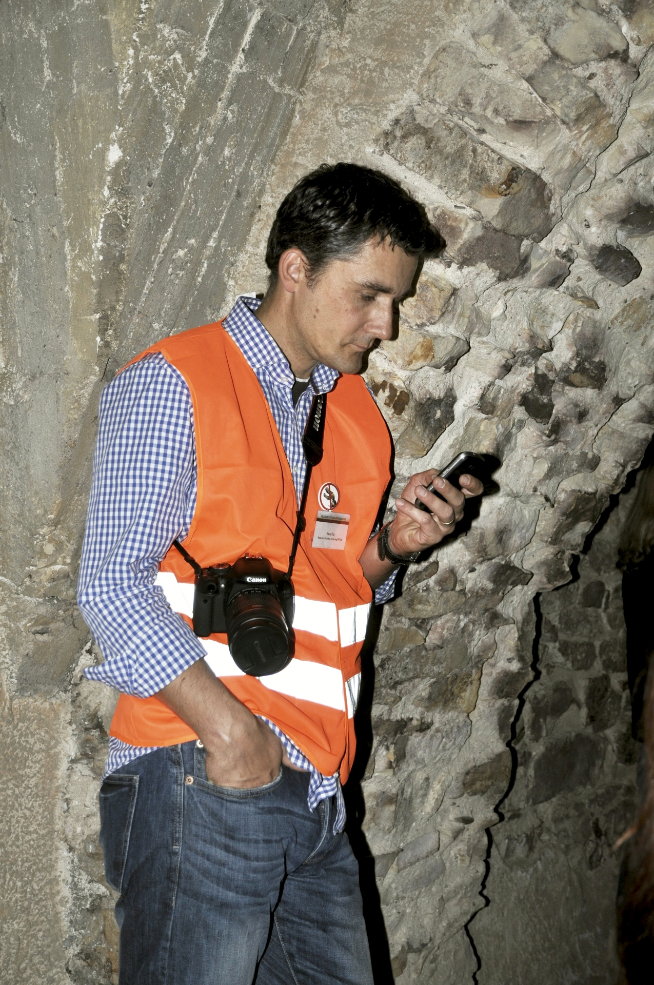 Pavel Titz a setkání dávnověku s technikou roku 2015 (organizace MDA 2015)